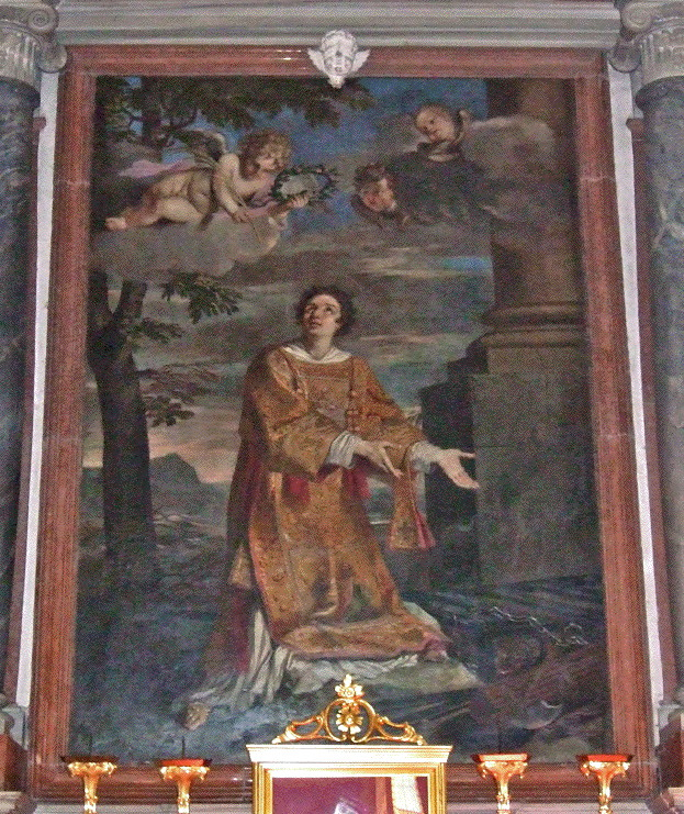 Emilio Taruffi Pala di San Lorenzo affresco Basilica Santa Maria in Porto - Ravenna